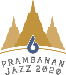 Prambanan 2020